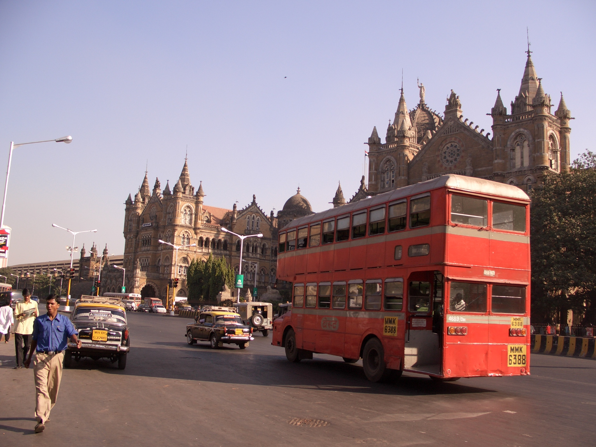 Victoria Terminus in Mumbai, India.